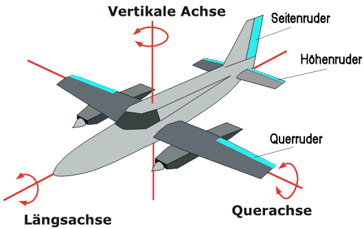 Rotationachsen und Ruder eines Flugzeug